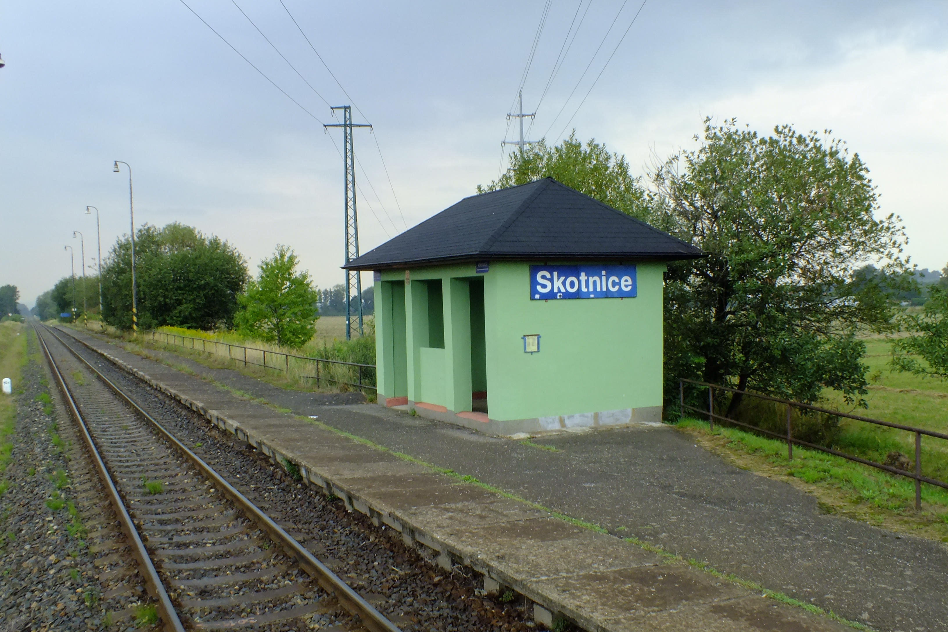 Budova zastávky